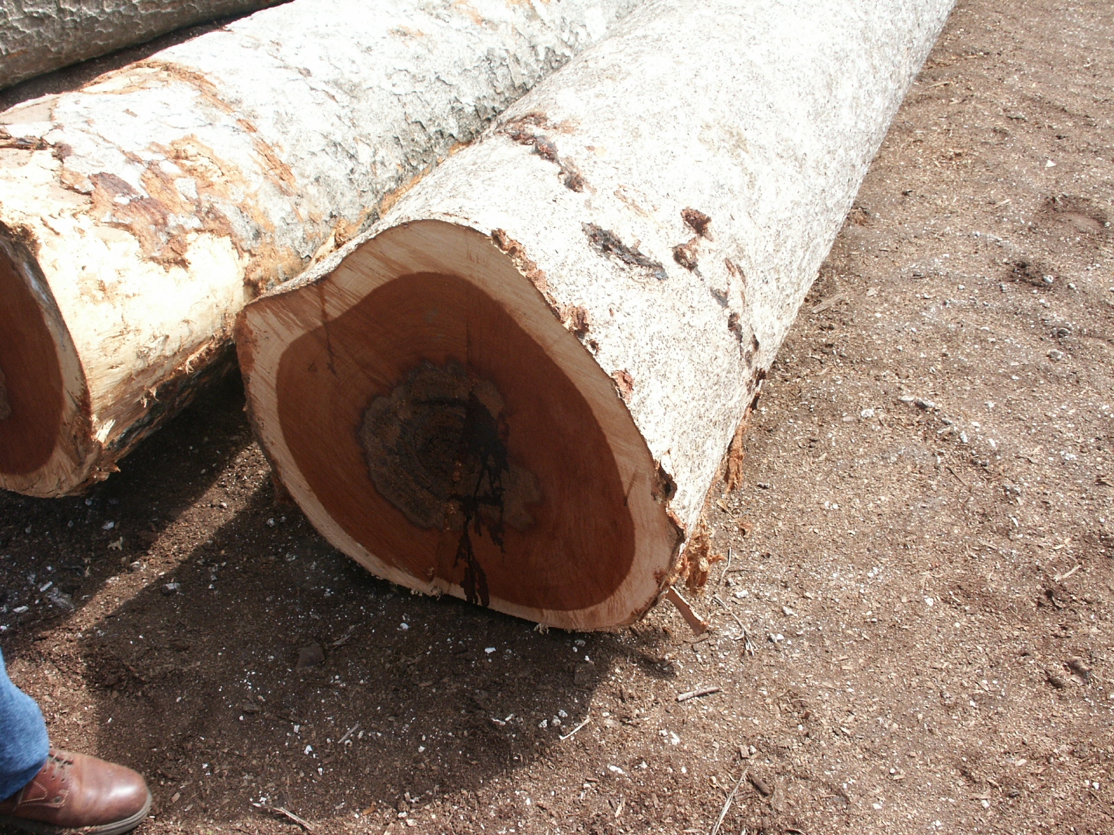 Apparence du bois de Kohu.